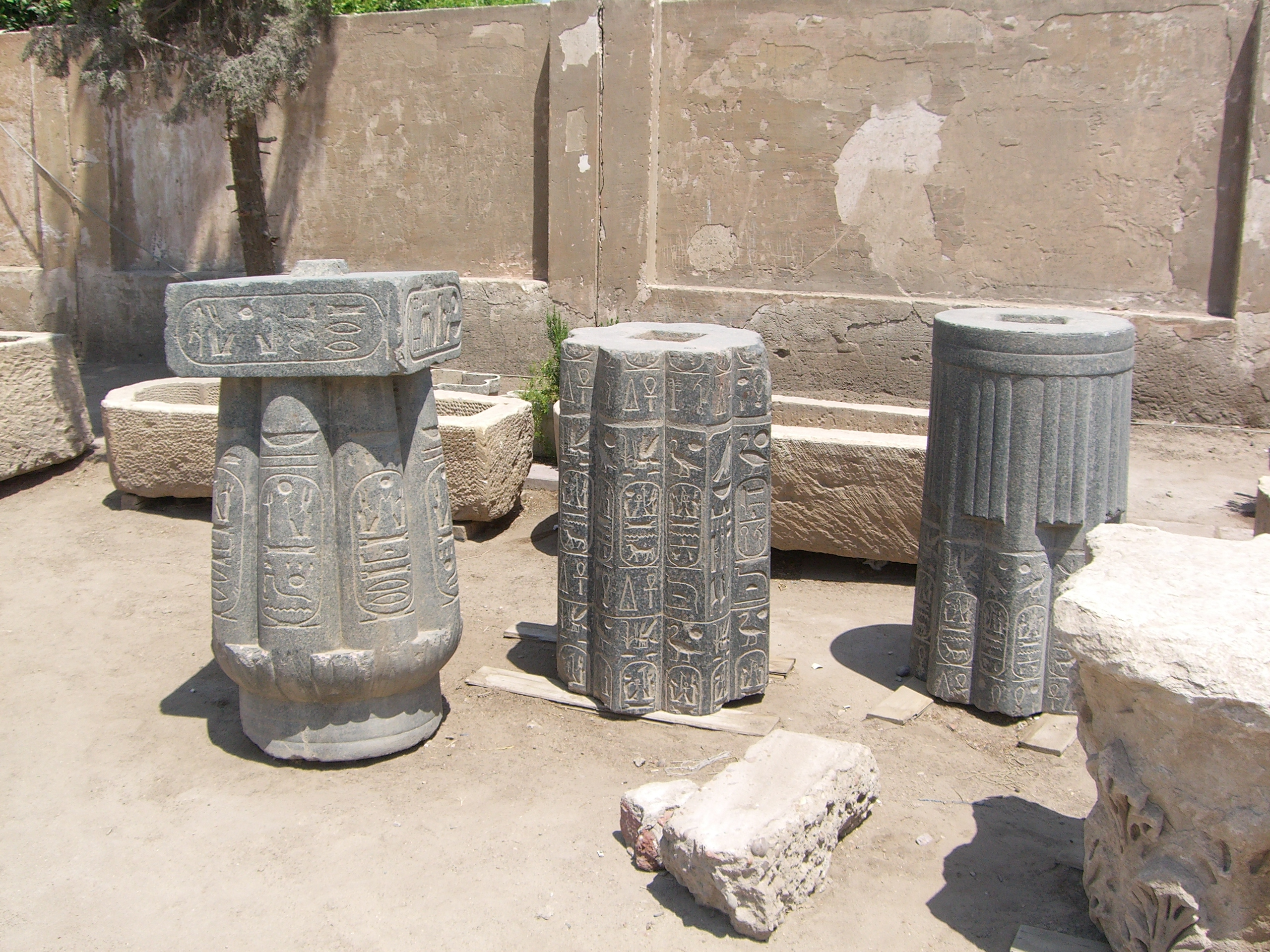 Colonnes papyriformes aux noms d'Aménophis III - XVIIIe dynastie, Mérenptah - XIXe dynastie et Sethnakht - XXe dynastie - Nouvel Empire user:Neithsabes